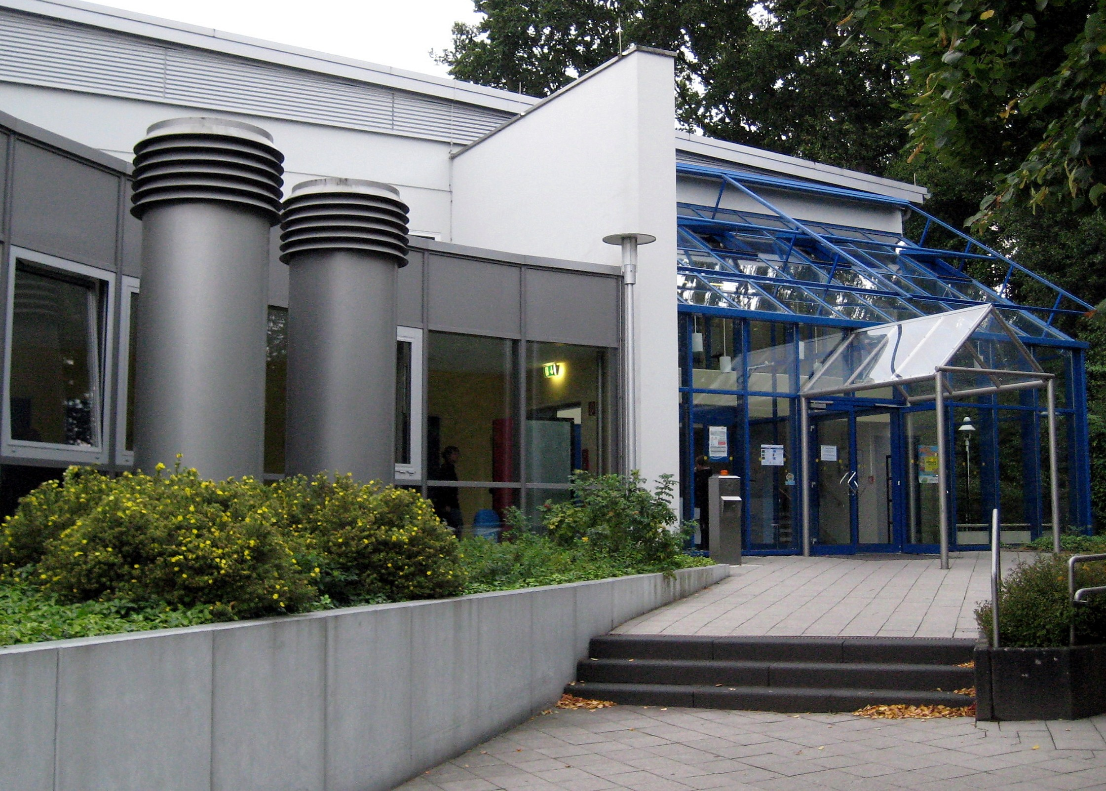 Hallenbad in Bünde, Kreis Herford, Nordrhein-Westfalen.